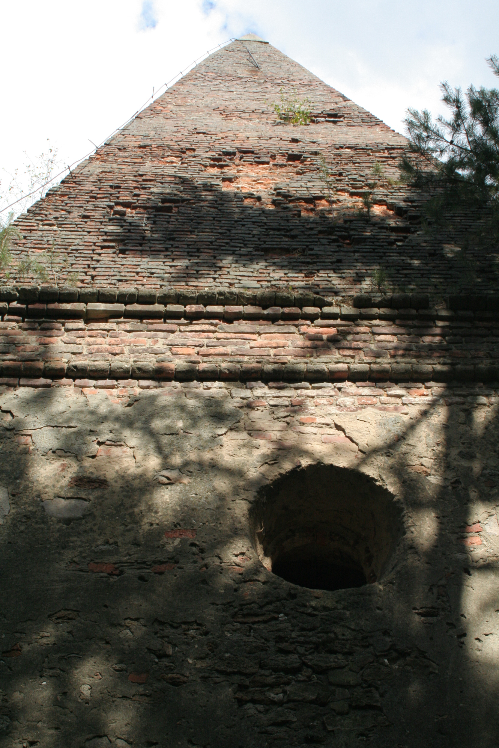 Tzw. Wieża Ariańska pod Krupem, niedaleko Chełma